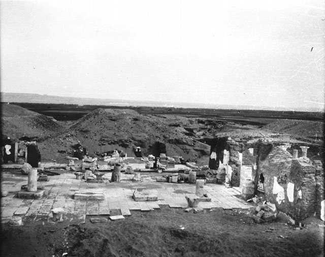 Трапезная в монастре апы Иеремии, Саккара.